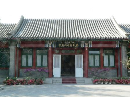 宋庆龄故居的门 拍摄